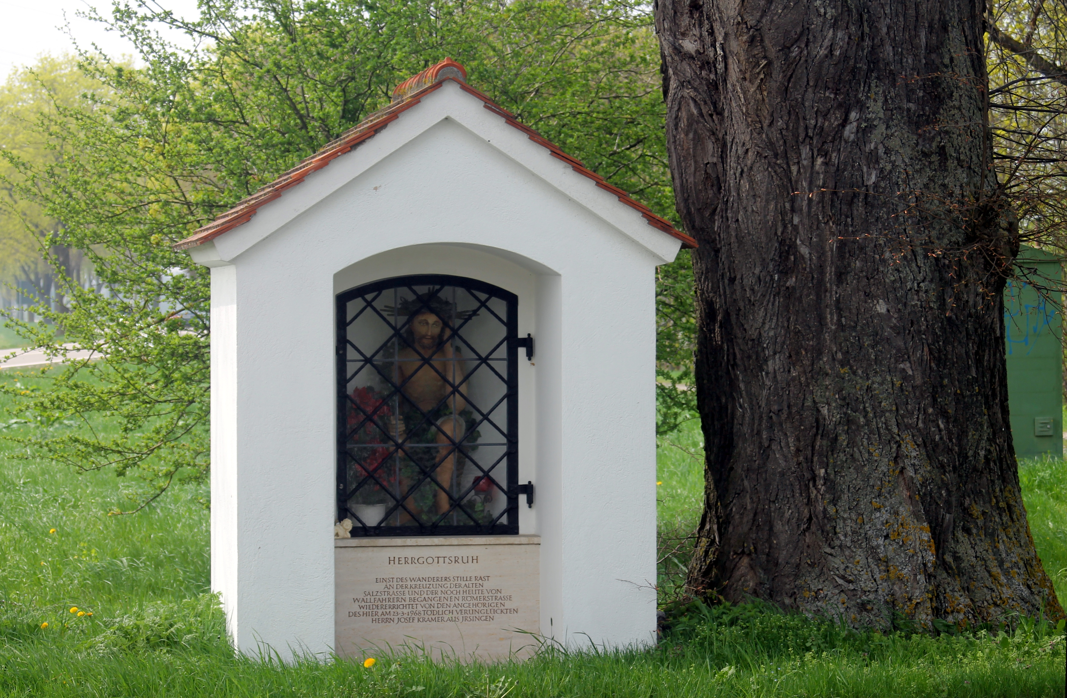 Herrgottsruh bei Zollhaus / Türkheim